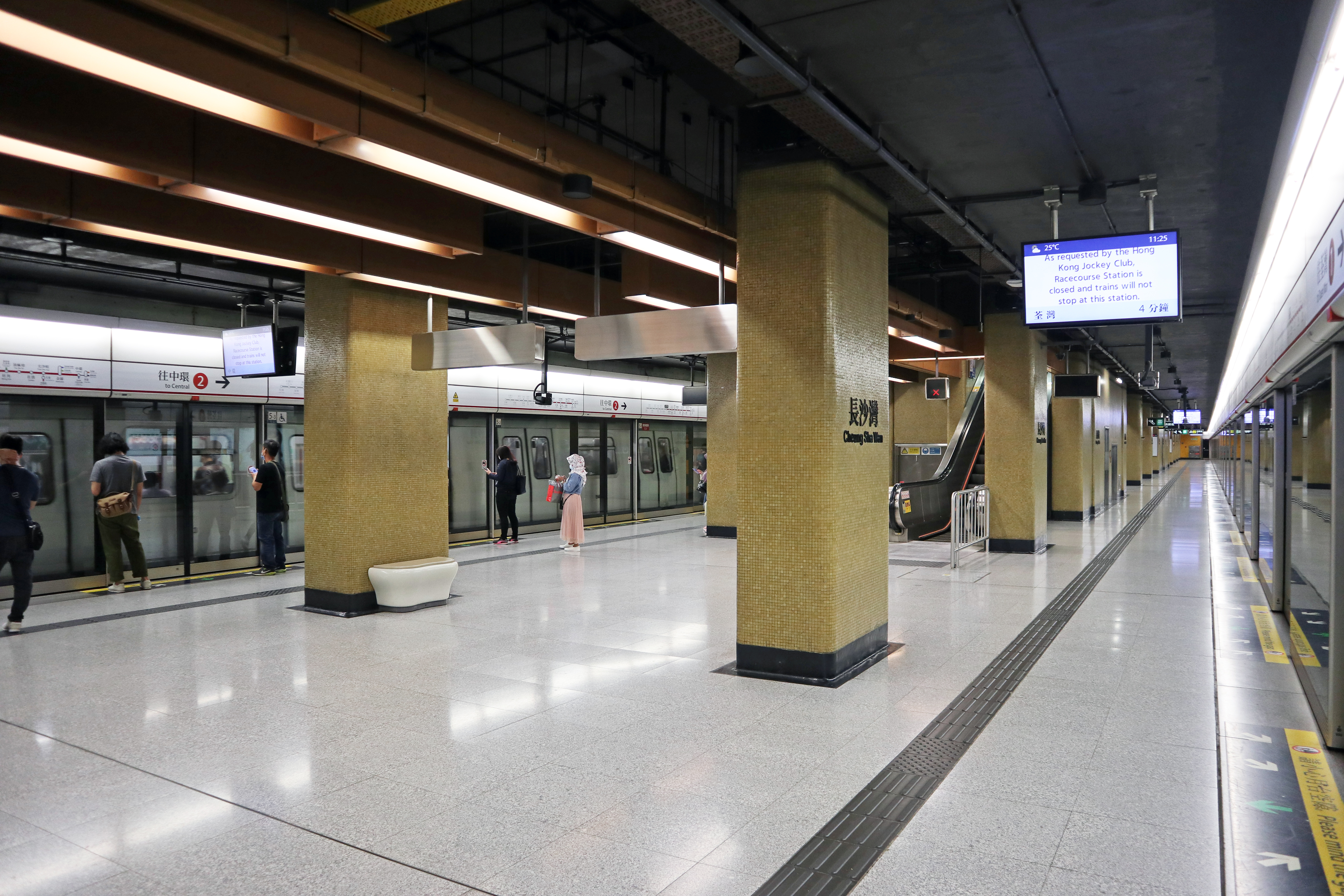 港鐵長沙灣站月台